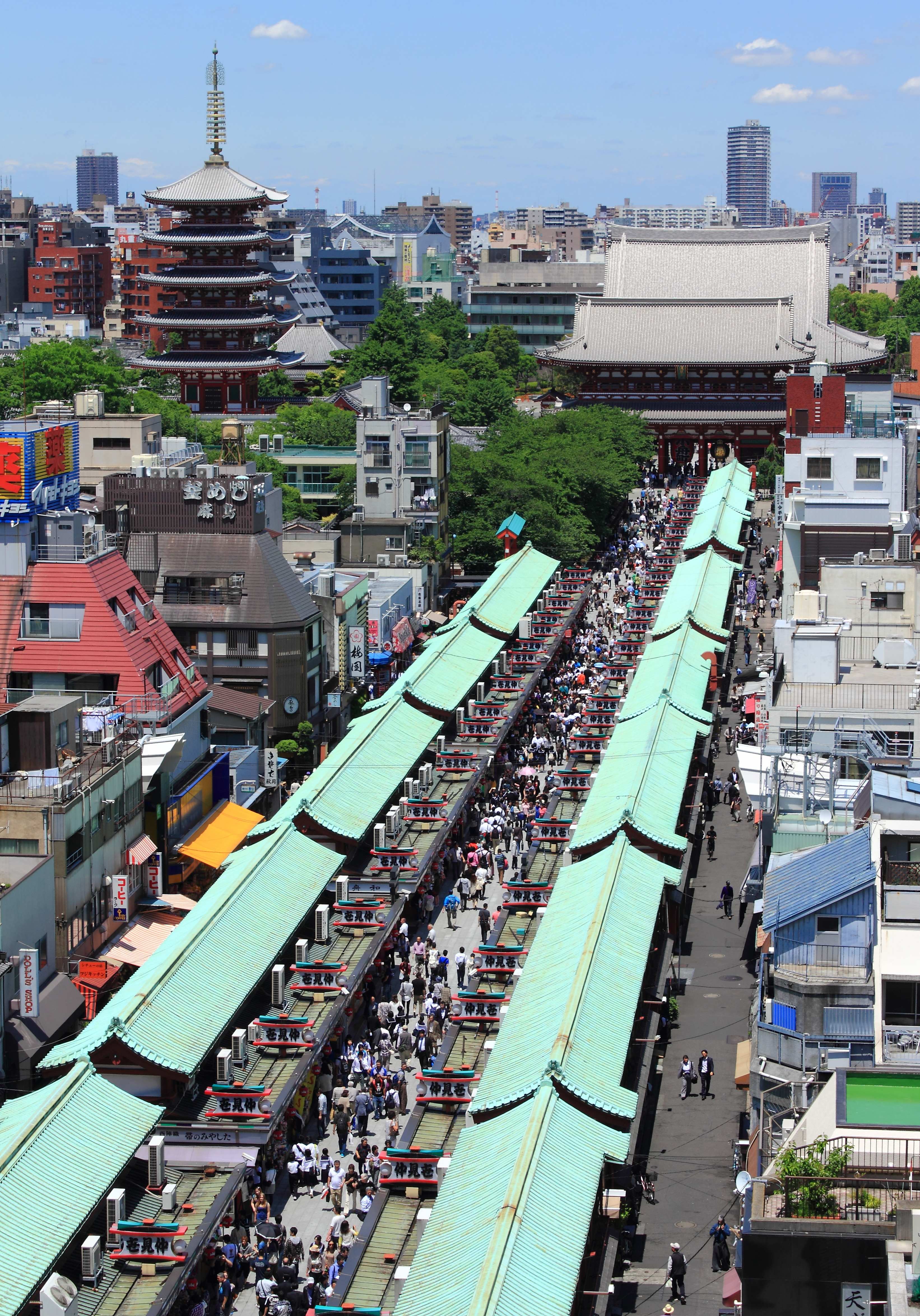 浅草寺。仲見世、宝蔵門、五重塔。東京都台東区。